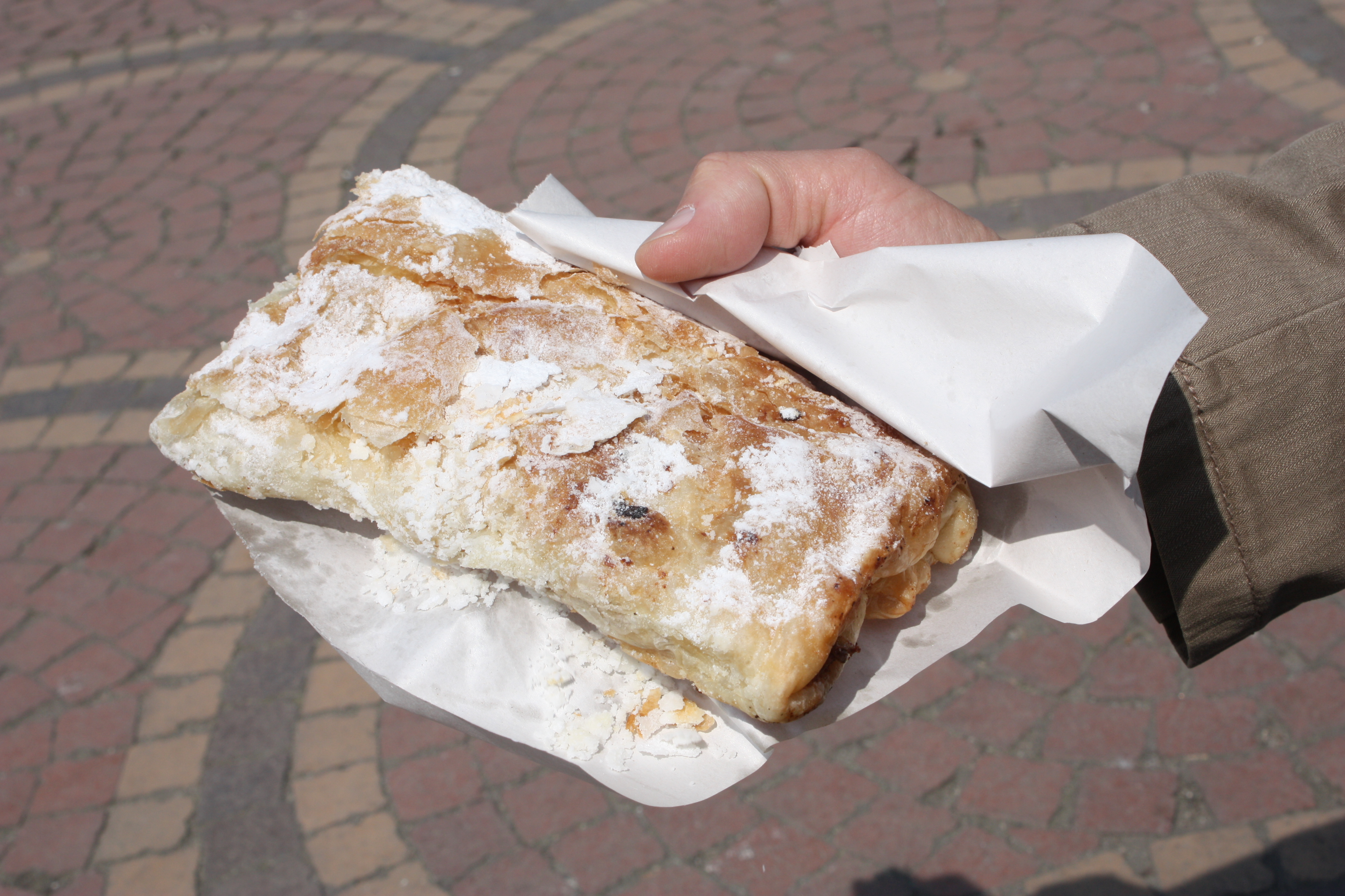 Banitsa Baniza баница Banica, in Sofia,Bulgaria